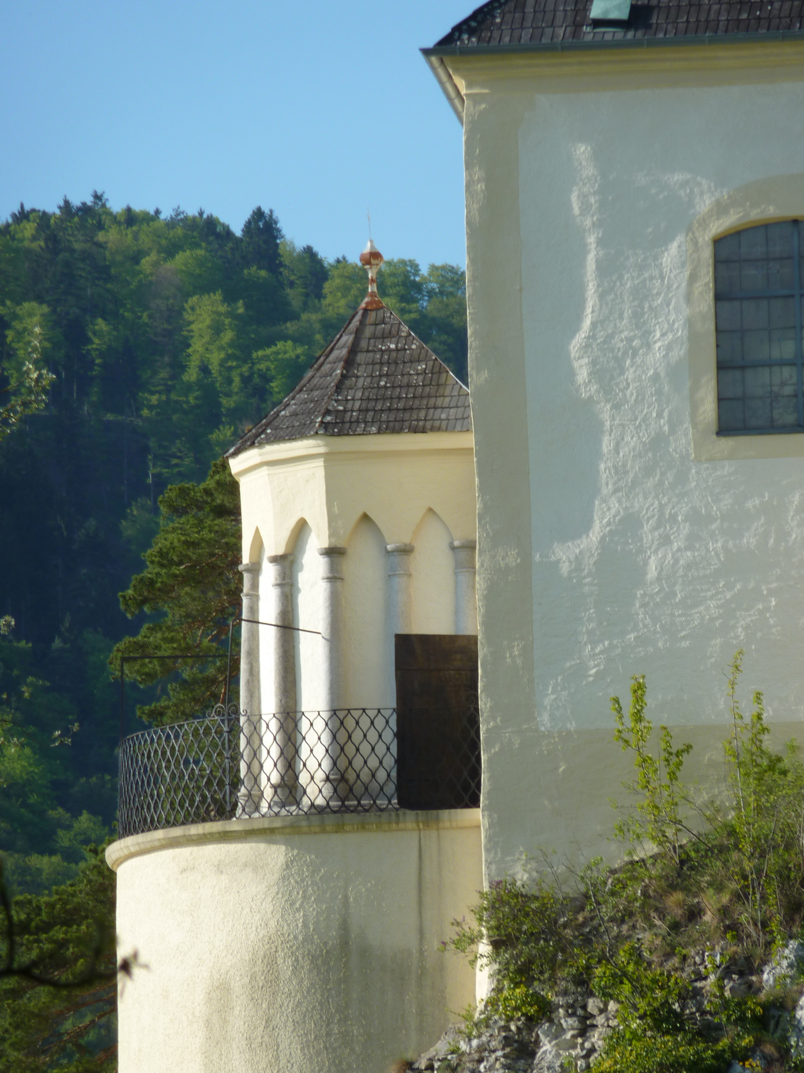 Pfarrkirche, ehem. Klosterkirche, Servitenkloster, Schönbühel an der Donau 49, Schönbühel-Aggsbach, Niederösterreich - Grab-Christi-Kapelle westlich der Pfarrkirche